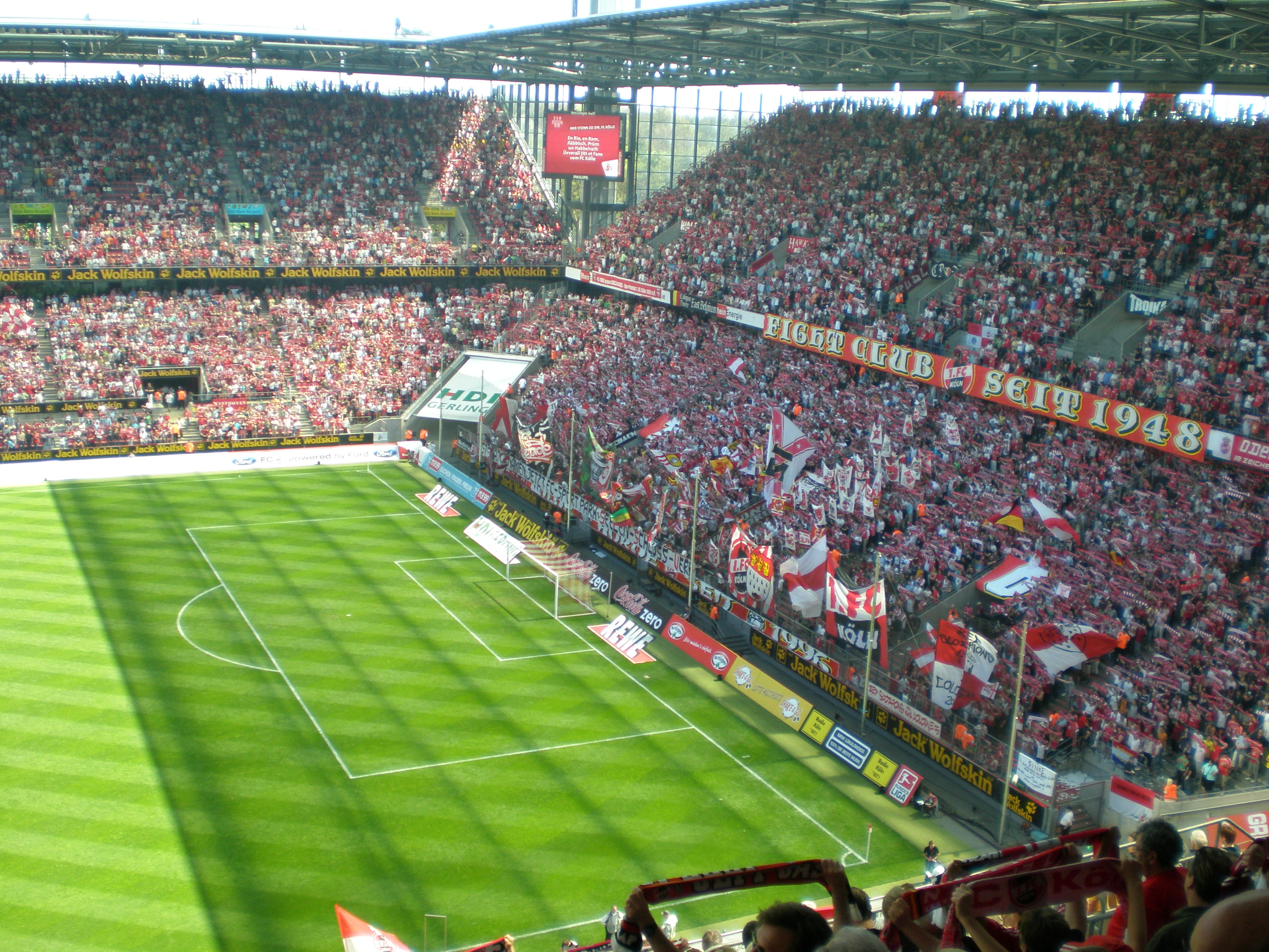 Fans des 1.FC Köln